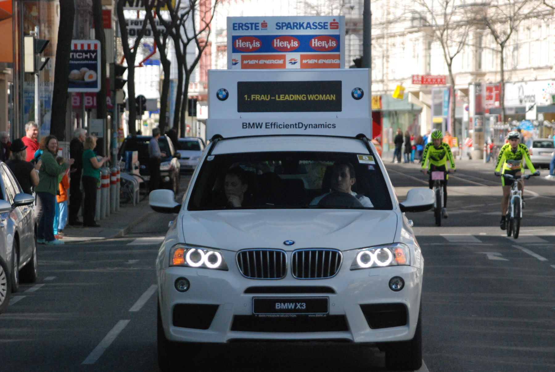 BMW-Begleitfahrzeug beim Vienna City Marathon 2013 auf der Mariahilfer Straße im 15. Wiener Gemeindebezirk